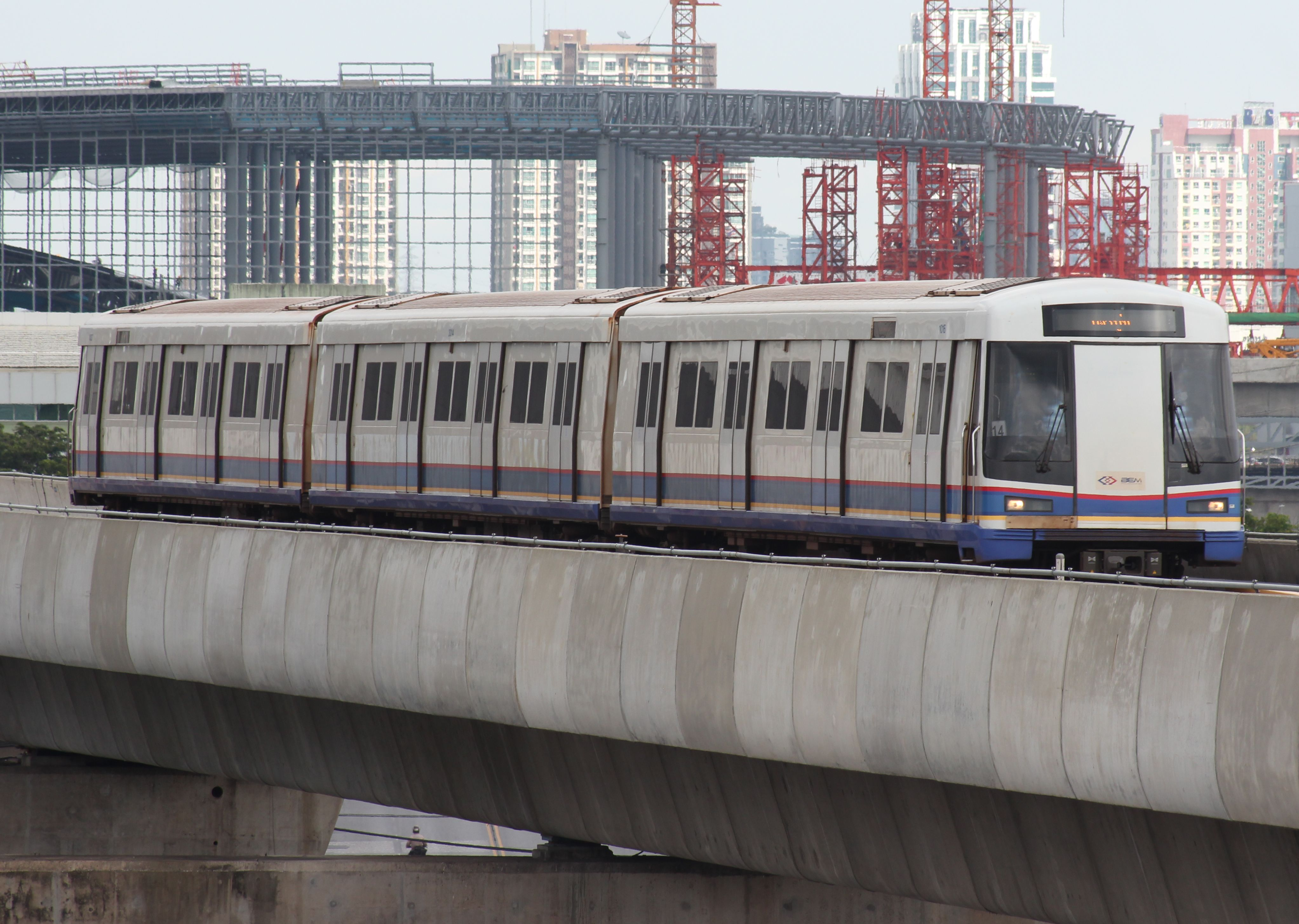 タイ王国 バンコク ブルーラインの車両